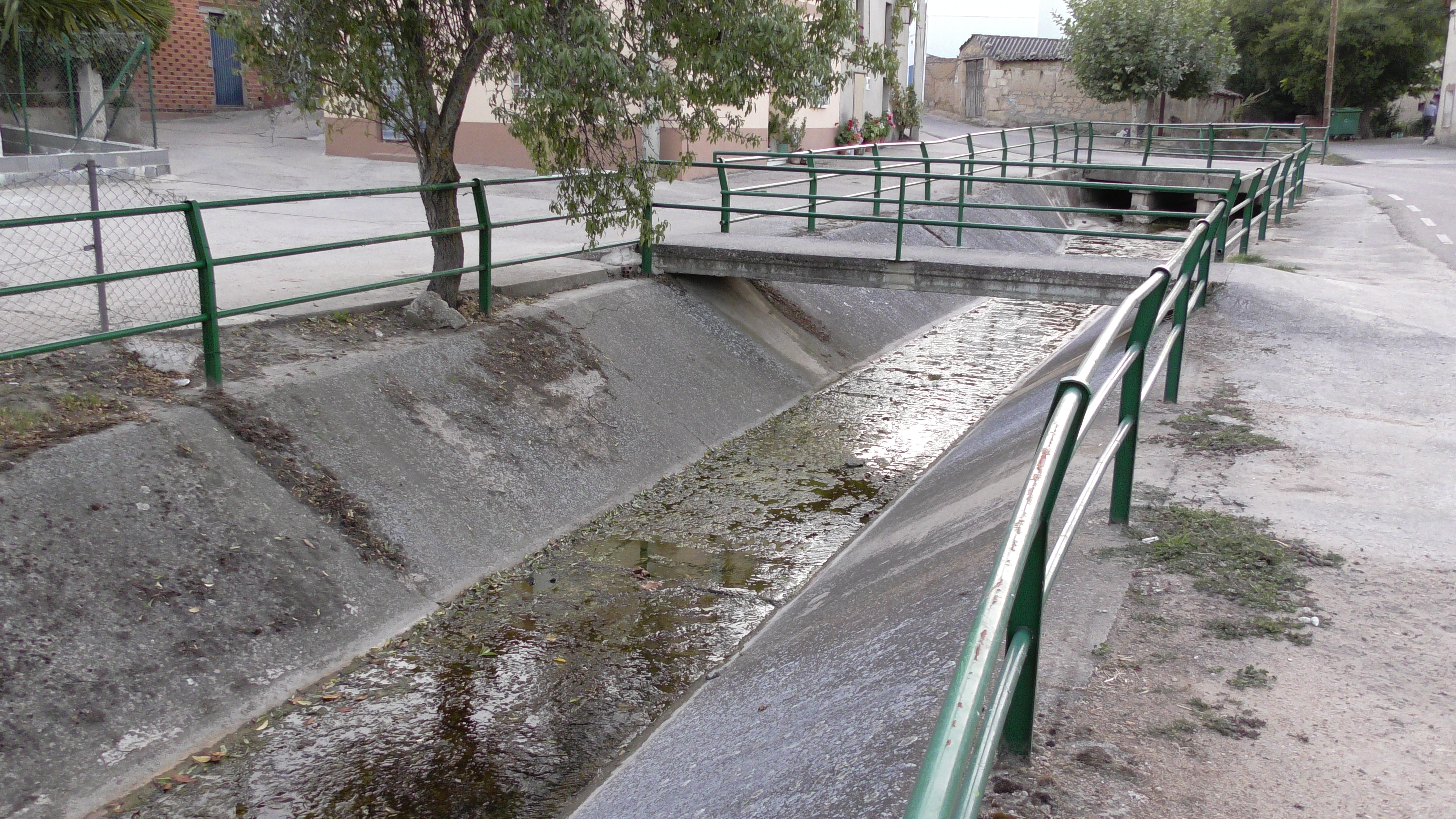 El Maderal